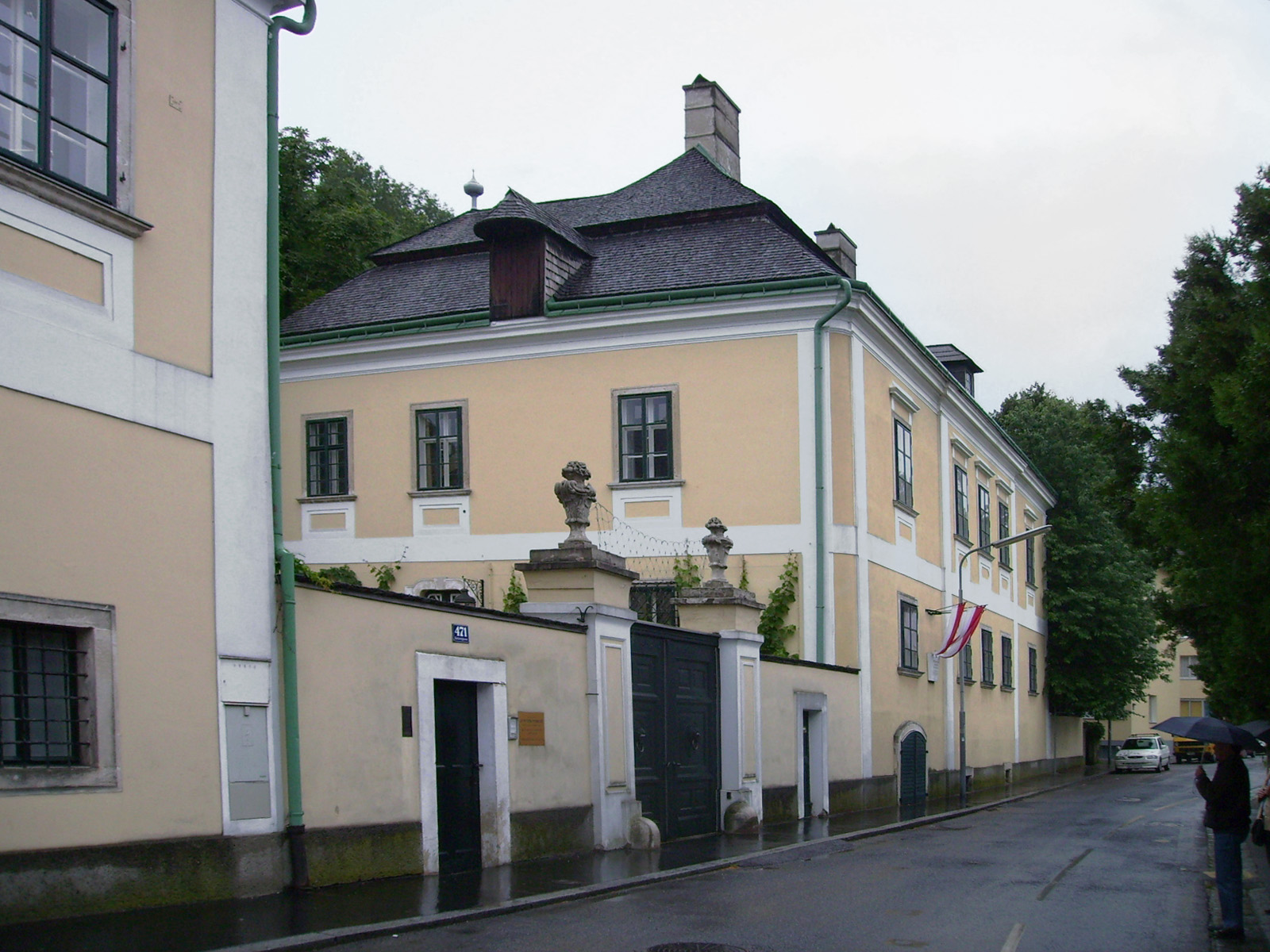 Rodauner Schlösschen. Wohnhaus des Dichters Hugo von Hofmannsthal in Wien-Rodaun.